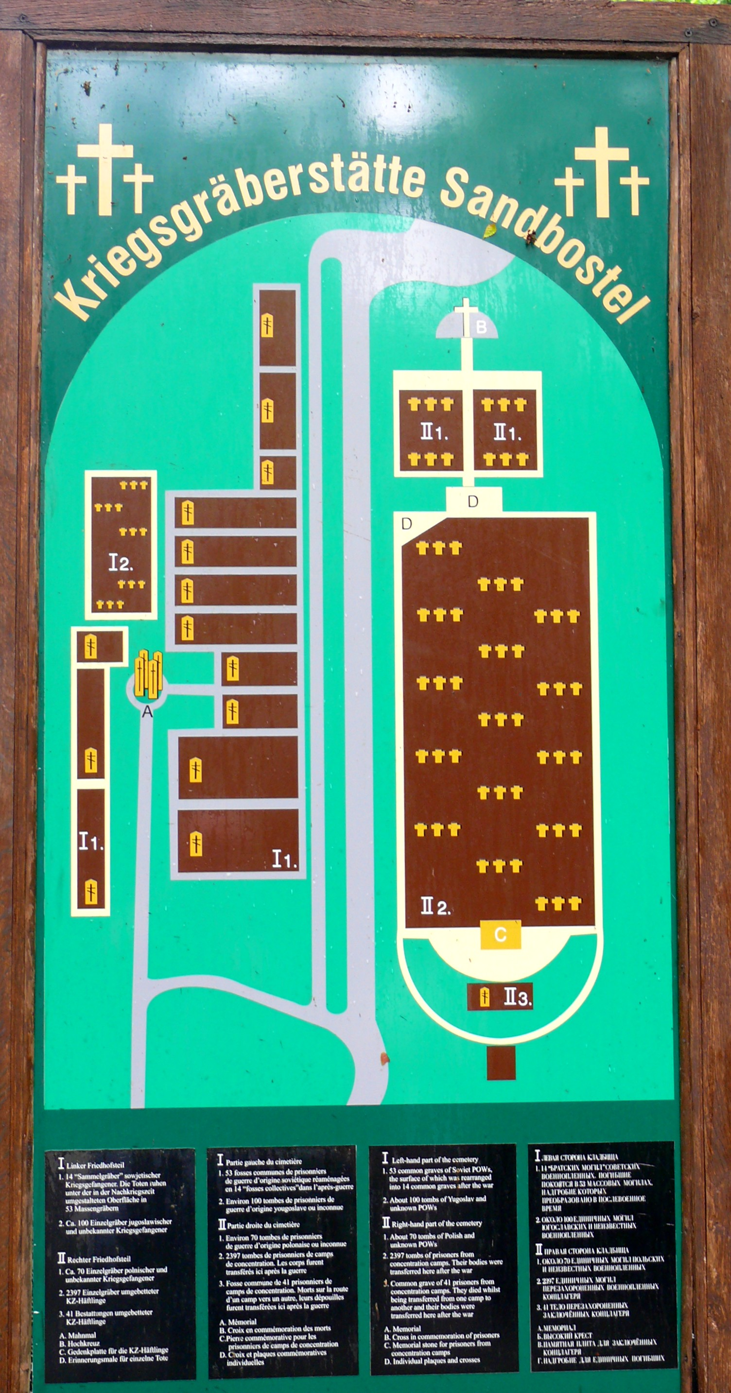 Gedenkstätte Stalag X B Sandbostel / Lagerfriedhof